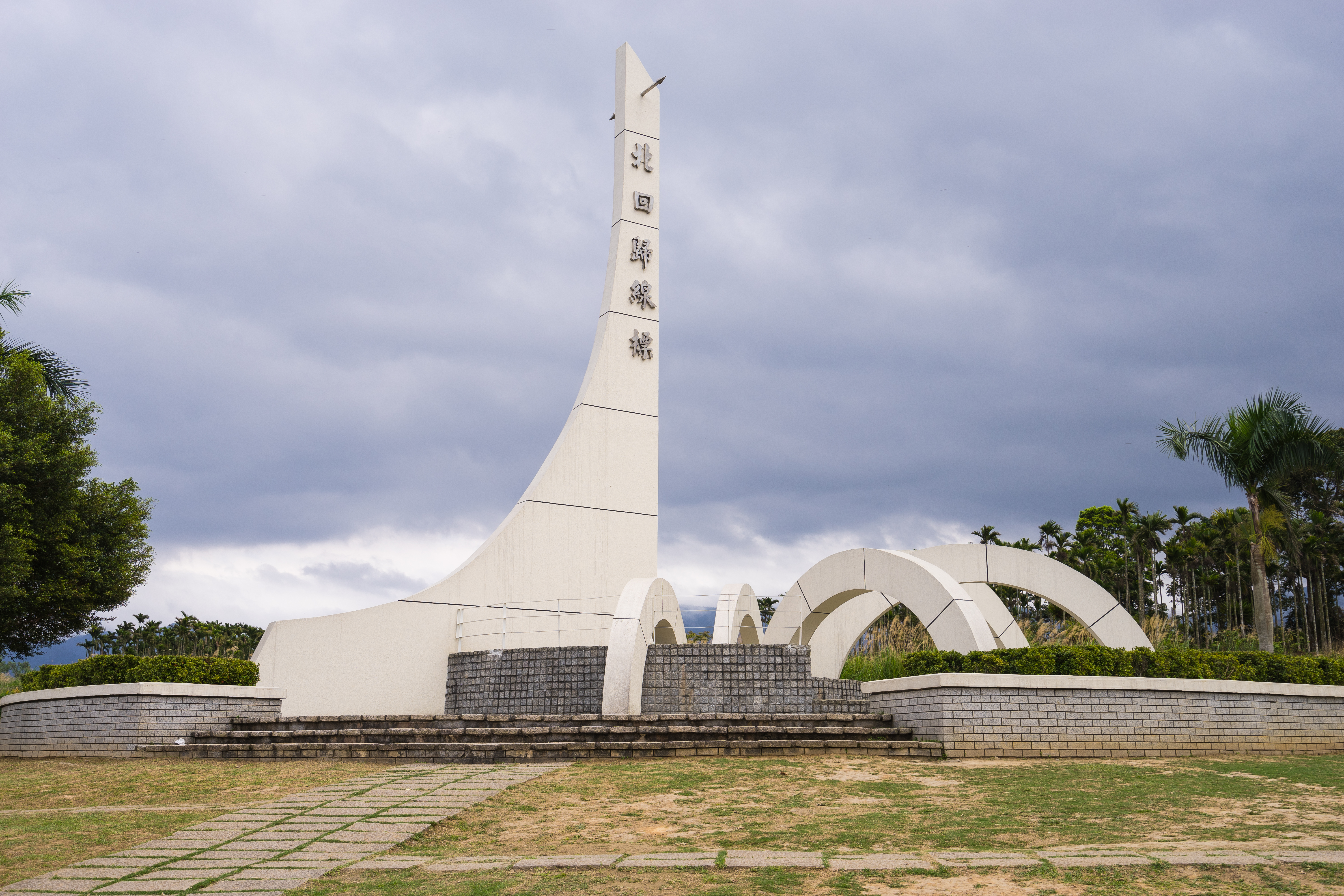 花蓮縣瑞穗鄉北回歸線標誌碑。